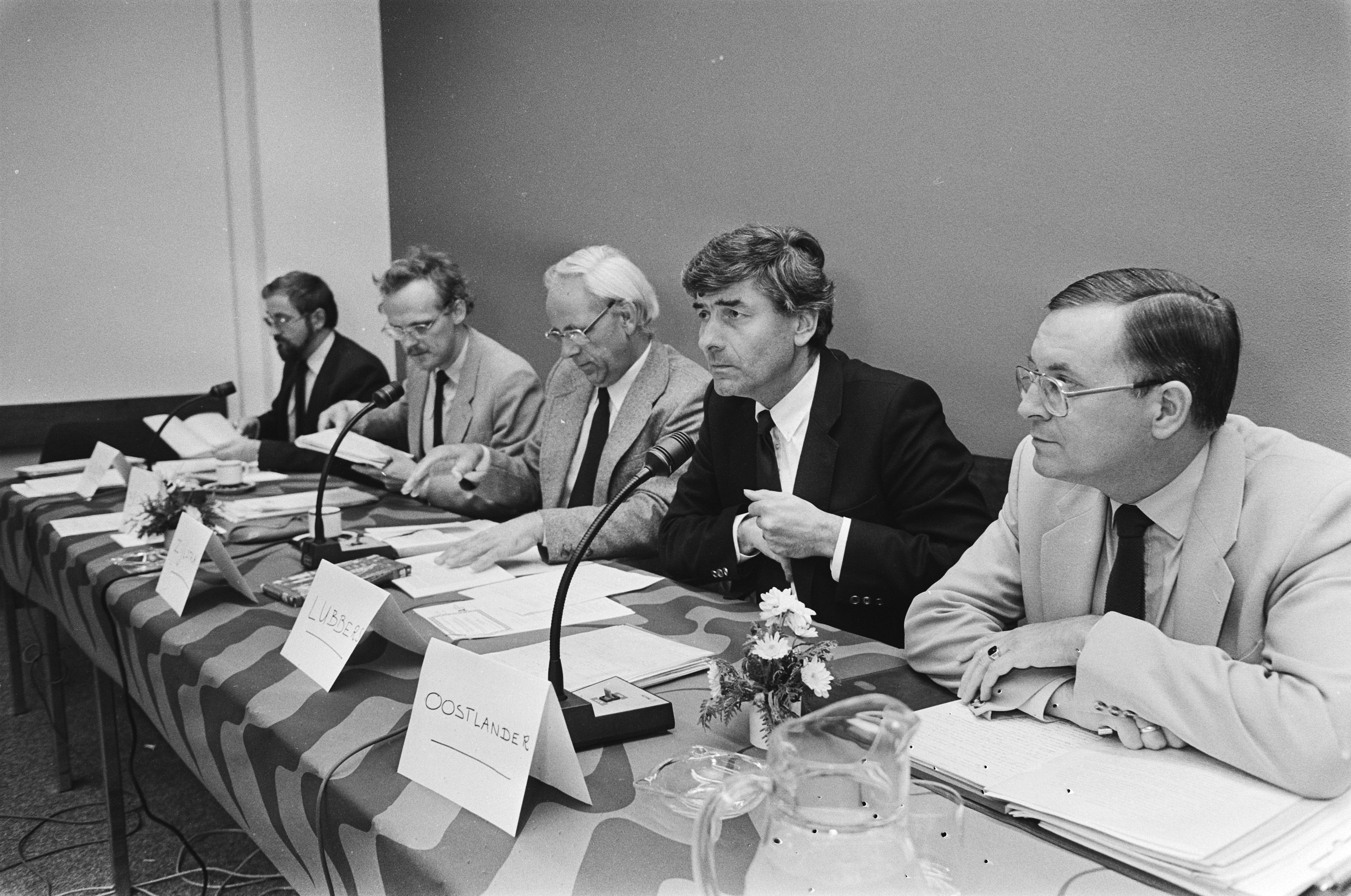 Collectie / Archief : Fotocollectie Anefo Reportage / Serie : CDA-Pastoresconferentie Beschrijving : Premier Lubbers (m), dhr. Oostlander (r) Datum : 13 september 1983 Trefwoorden : conferenties, kerken, ministers-presidenten, politieke partijen, samenwerking, voorzitters Persoonsnaam : Lubbers, Ruud, Oostlander, A.M. Fotograaf : Croes, Rob C. / Anefo Auteursrechthebbende : Nationaal Archief Materiaalsoort : Negatief (zwart/wit) Nummer archiefinventaris : bekijk toegang 2.24.01.05 Bestanddeelnummer : 932-6963